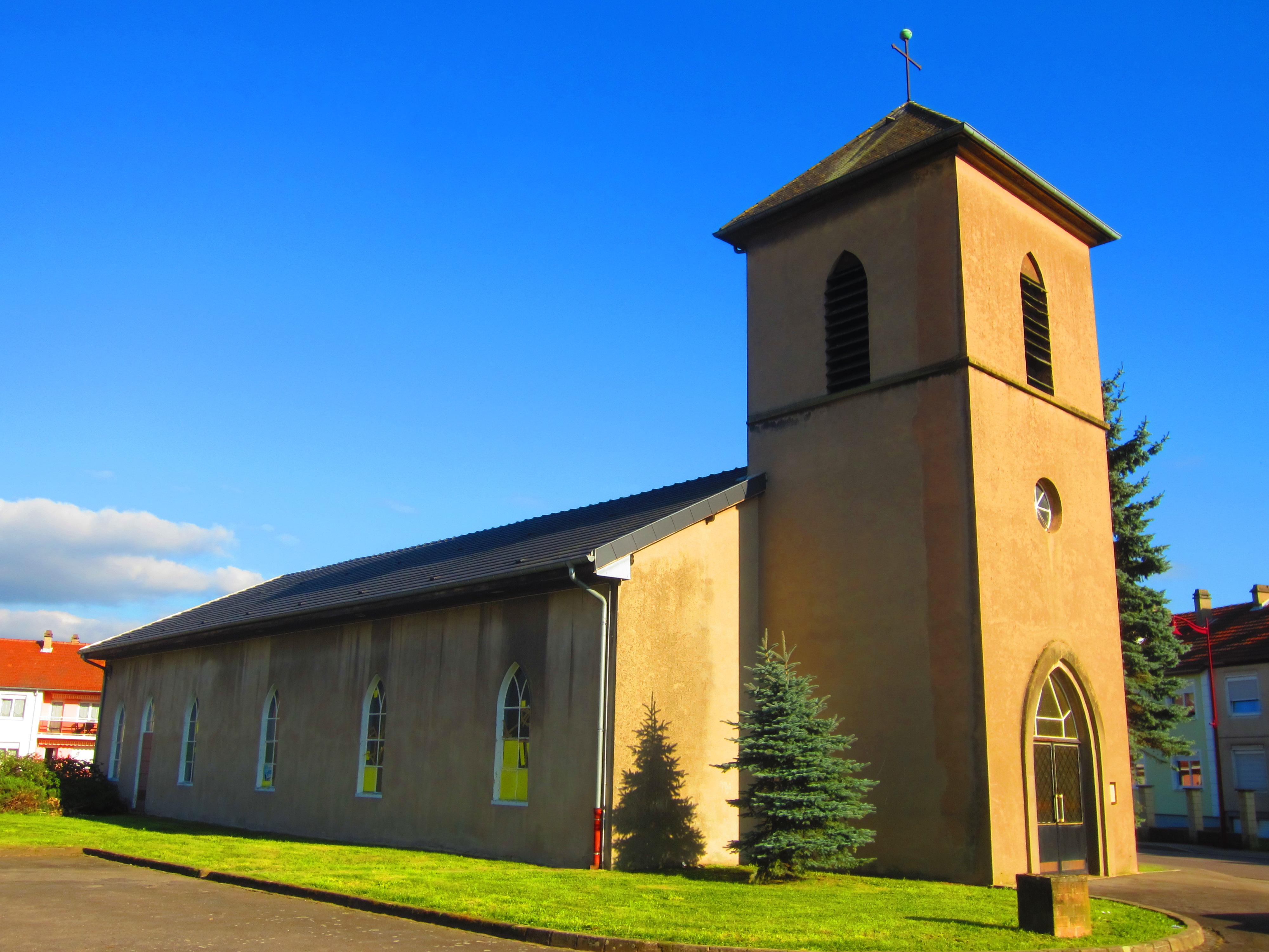 Eglise Sainte Thérèse, à L'hopital